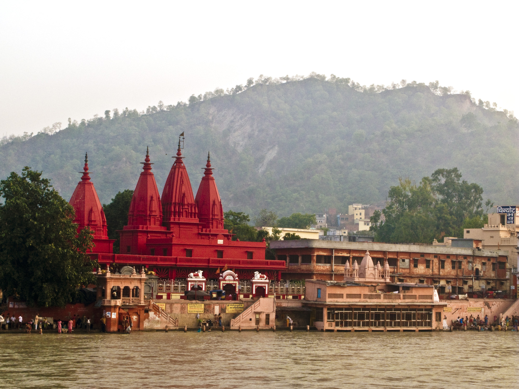 haridwar